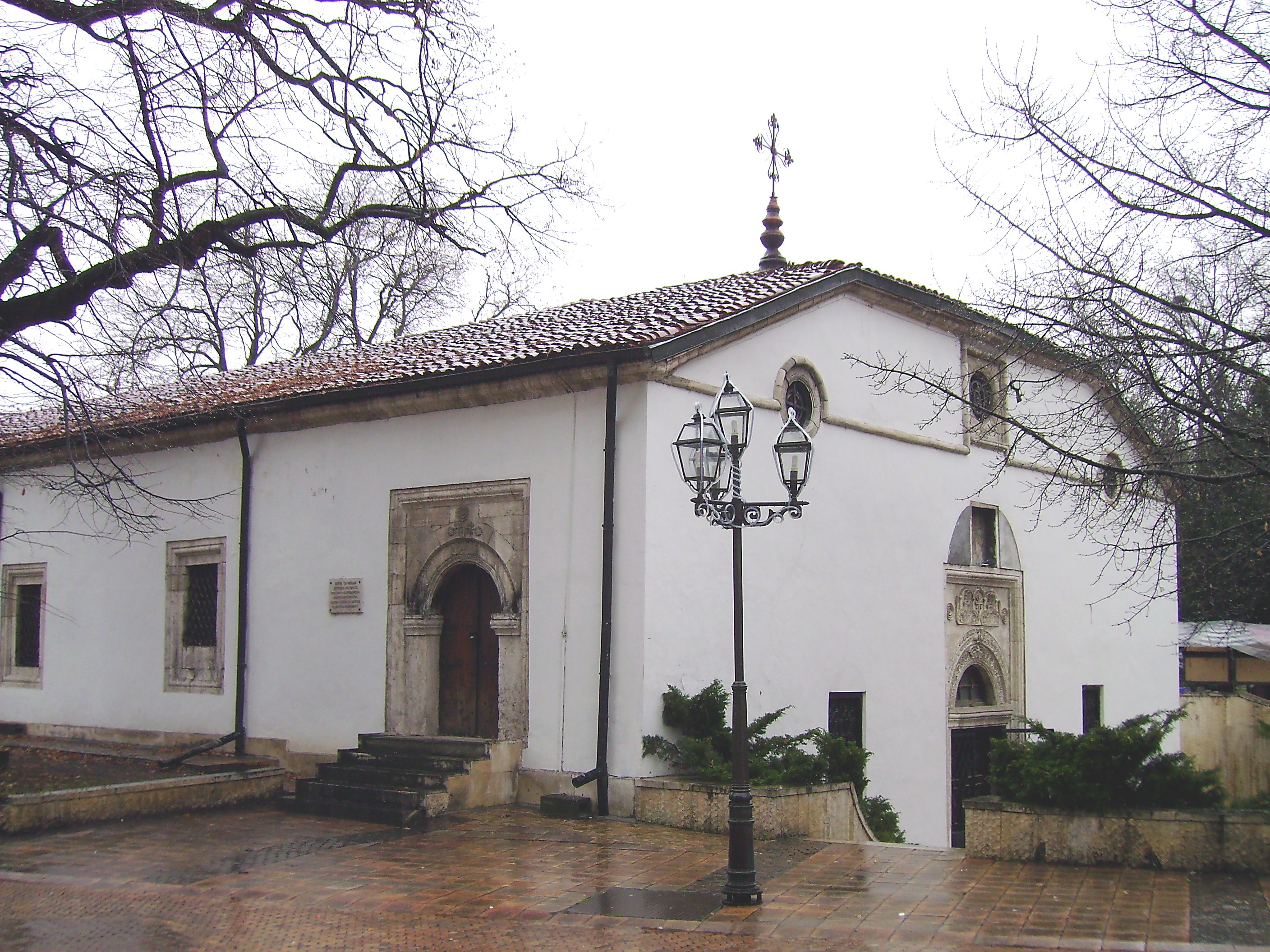 Църква "Св. Николай" / St Nicholas Church